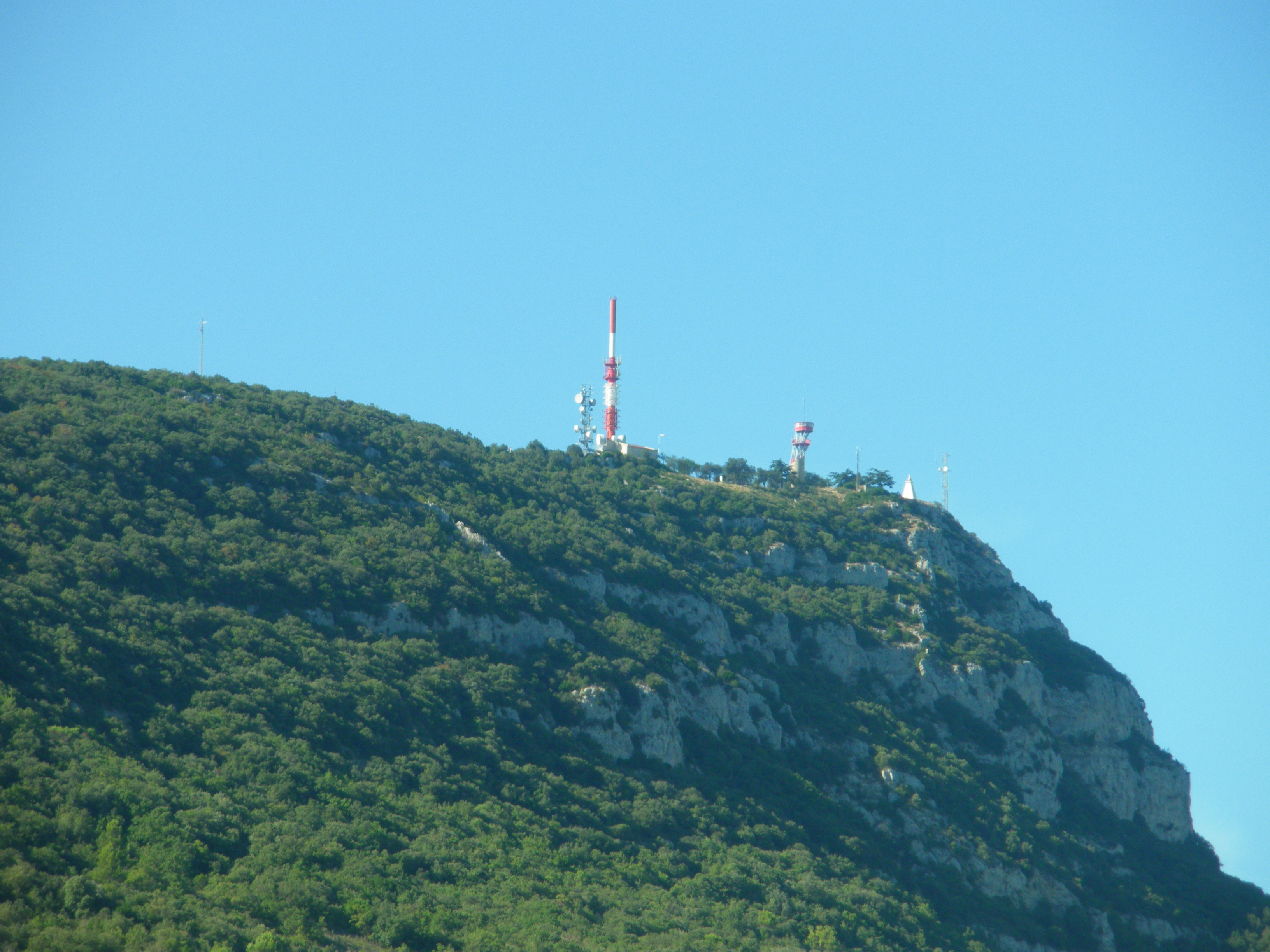 Mont Bouquet (Brouzet-lès-Alès - Gard - France)